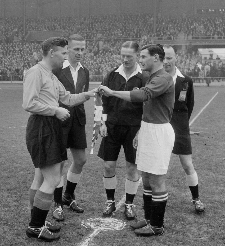 Nederland tegen Zwitserland. Abe Lenstra en Jacques Fatton.